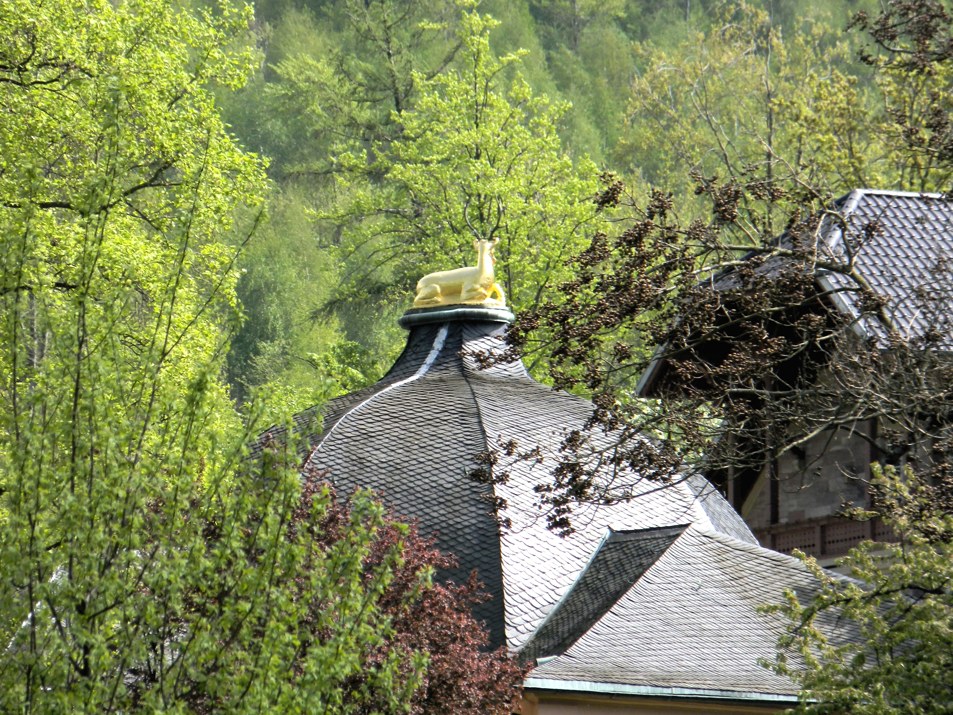 Kuppel des Jagdhauses Fremersberg bei Sinzheim mit vergoldetem Hirsch